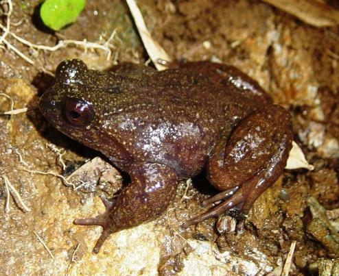 Sapo de Mehuín (Insuetophrynus acarpicus).